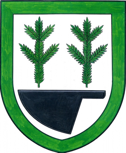 znak, Radíkov, okres Přerov